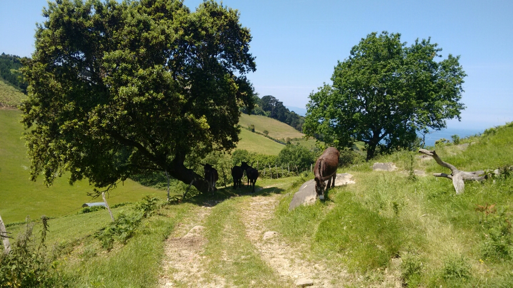 Astoak San Prudentzio inguruko bide ondoan.